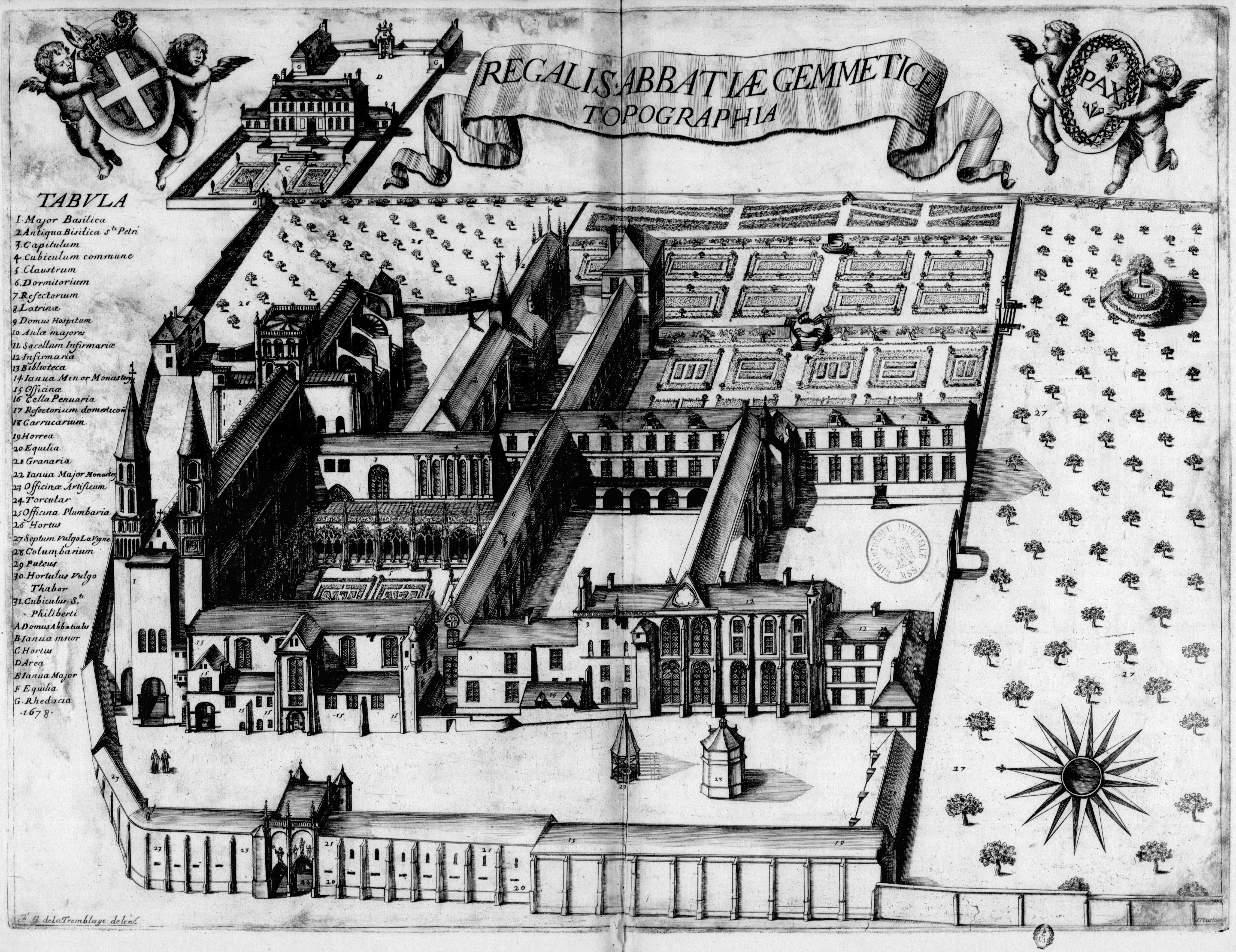 Planche gravée du 17ème siècle représentant l'abbaye Saint-Pierre de Jumièges, dans le livre Monasticon Gallicanum.